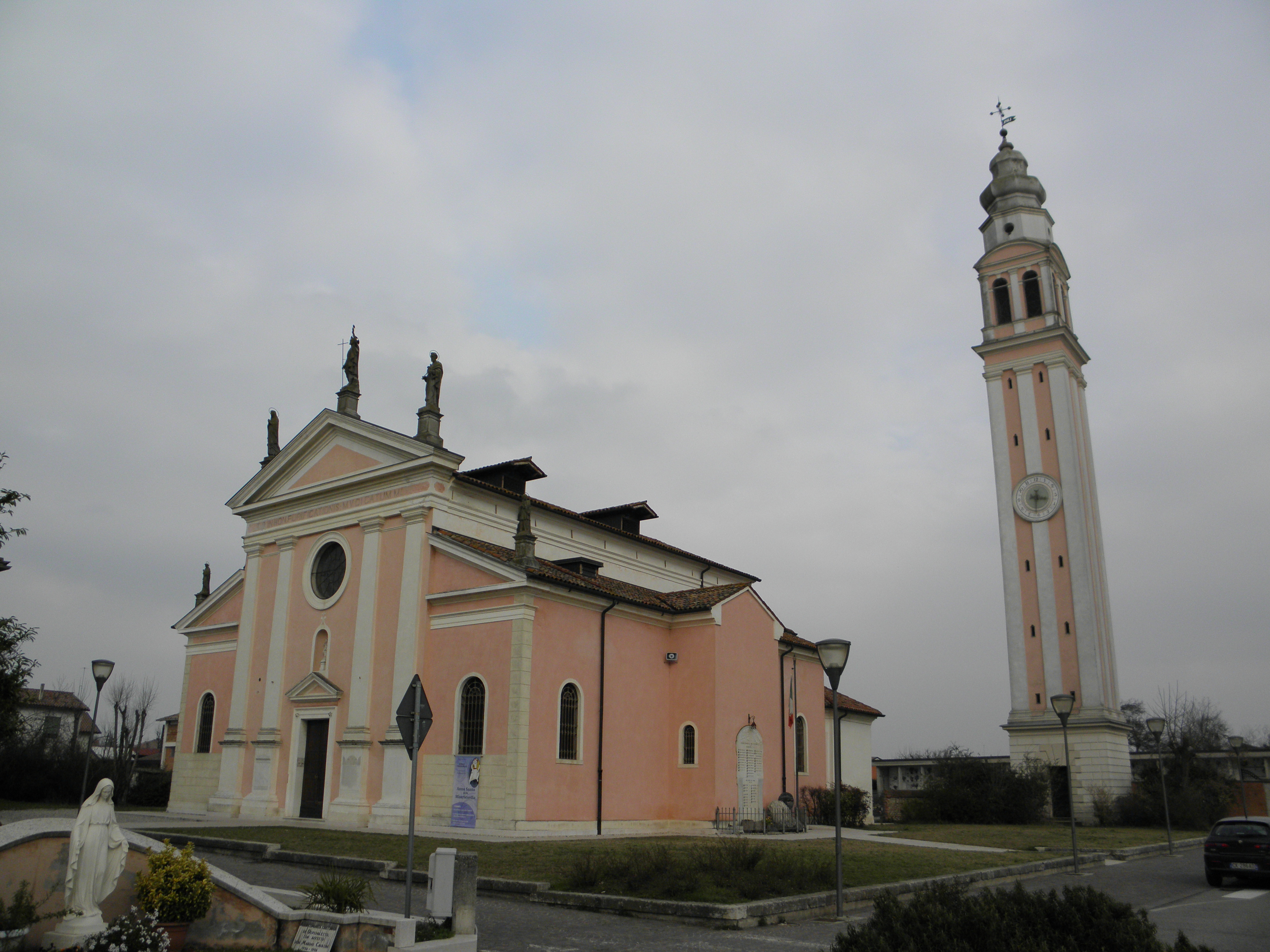 Ospedaletto, frazione di Istrana: la chiesa parrocchiale della Purificazione della Beata Vergine Maria (XVIII secolo con ampliamenti successivi).